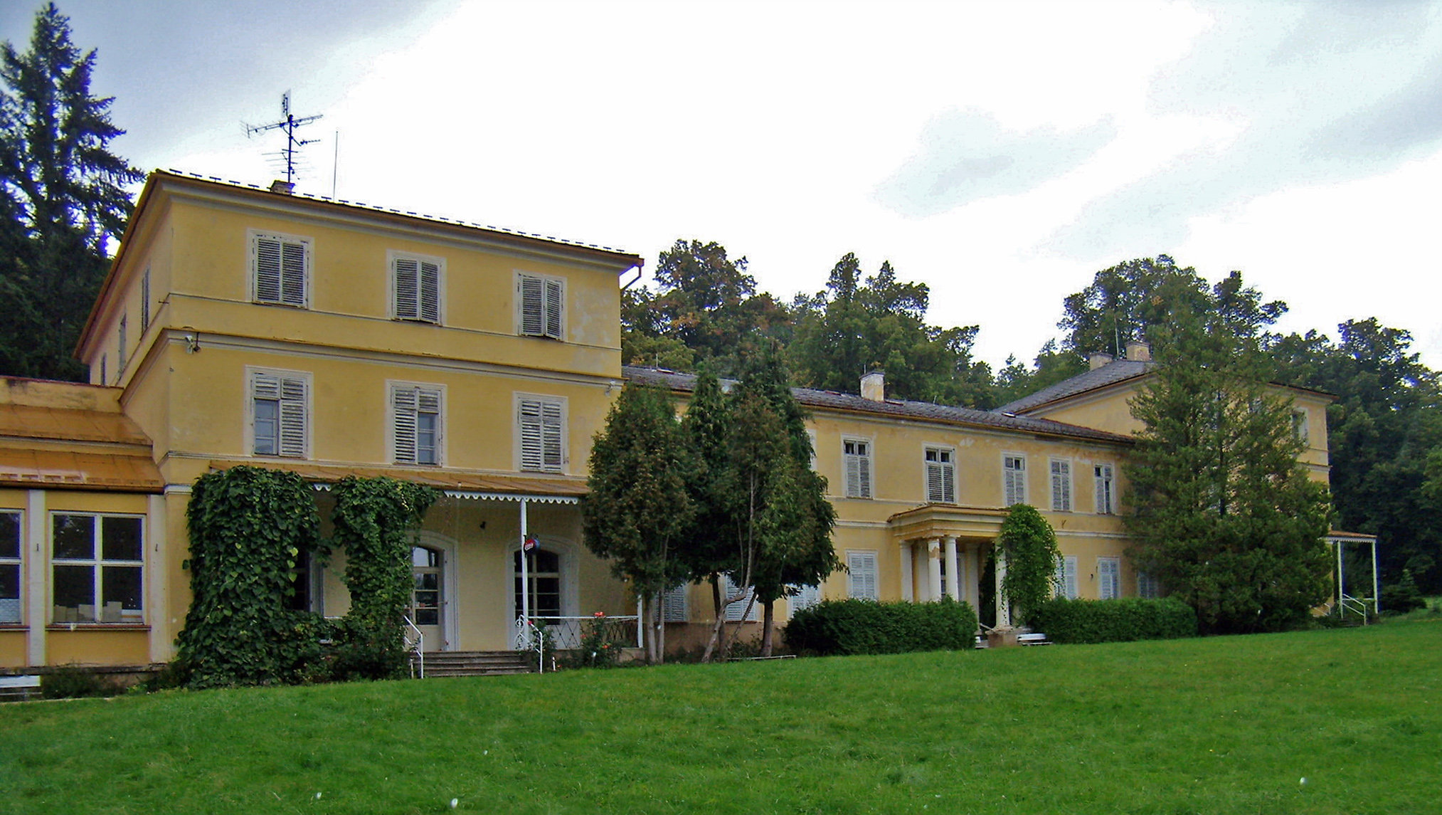 Chudenice - zámek Lázeň